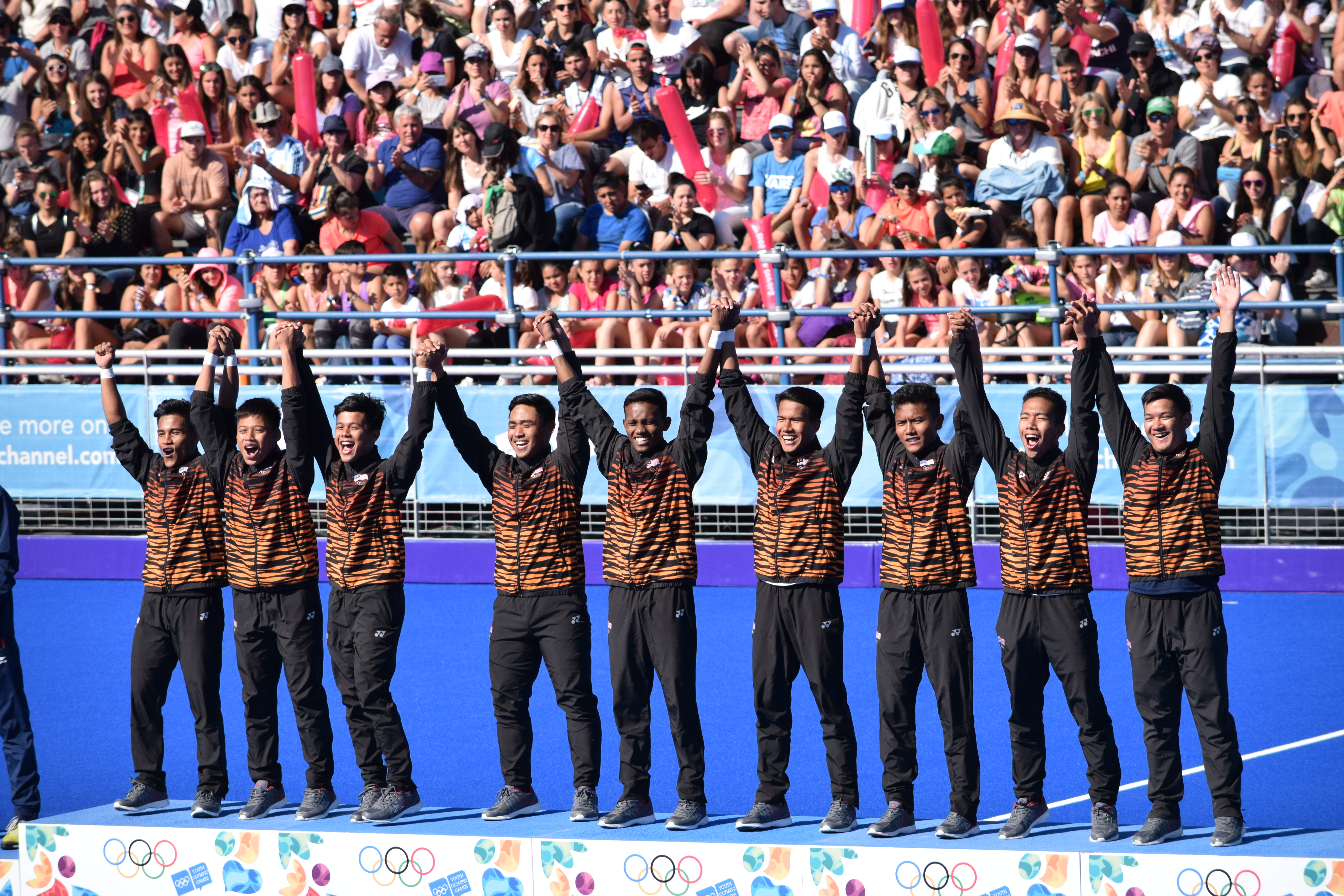 Ceremonia de premiación durante los Juegos Olímpicos de la Juventud 2018 en Buenos Aires. Tarde del 14 de octubre. Hamiz AHIR, Shahrul SAUPI, Amirul AZAHAR, Arif ISHAK, Syarman MAT, Kamarulzaman KAMARUDDIN, Muhibuddin MOHARAM, Firadus ROSDI, Akhimullah ANUAR.